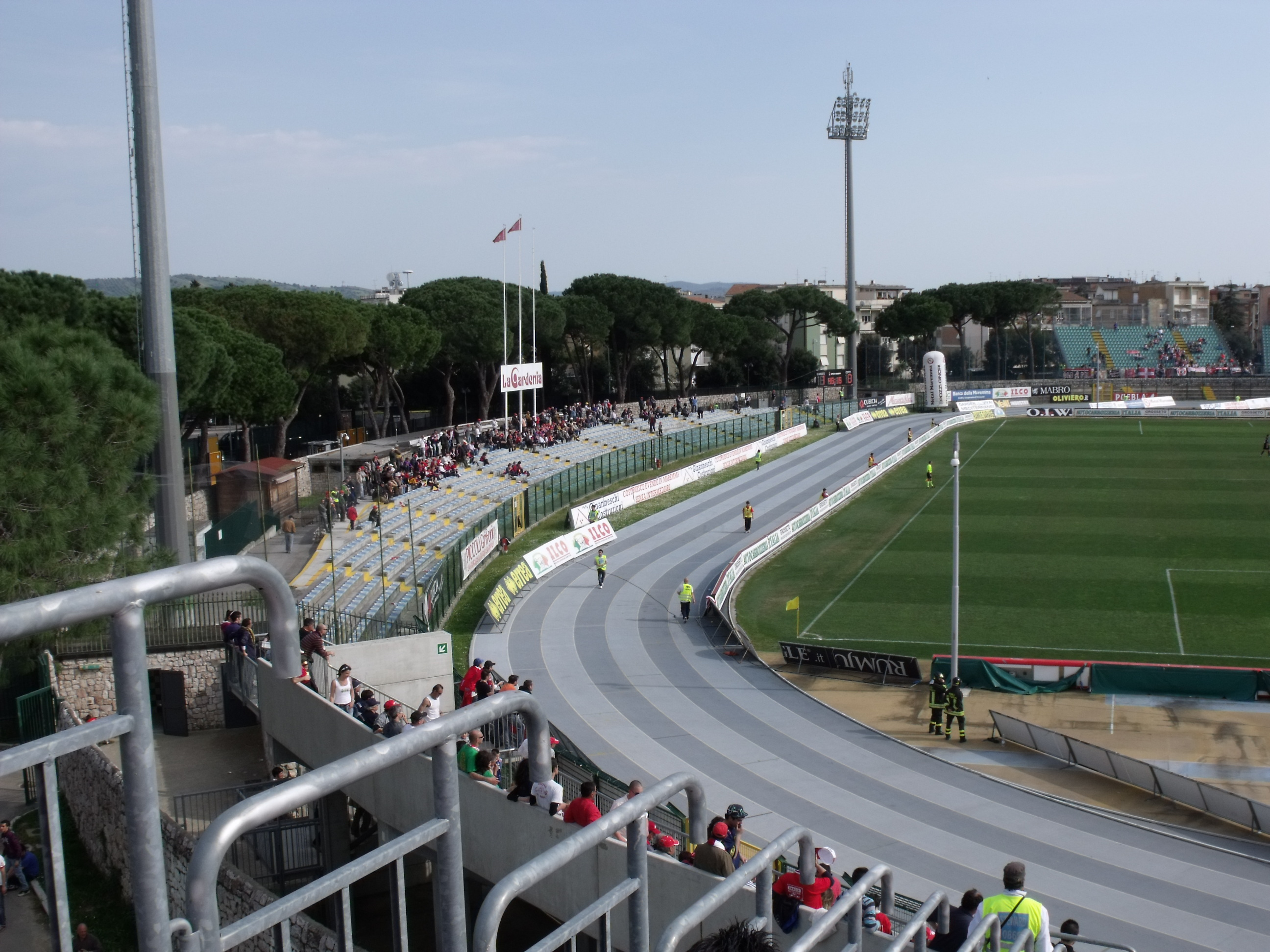 Gegengrade des Stadio Carlo Zecchini in Grosseto